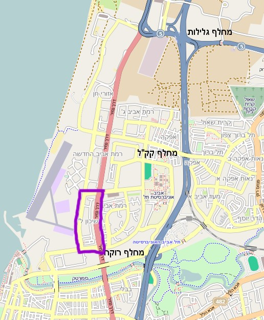 Tochnit Lamed, Tel Aviv